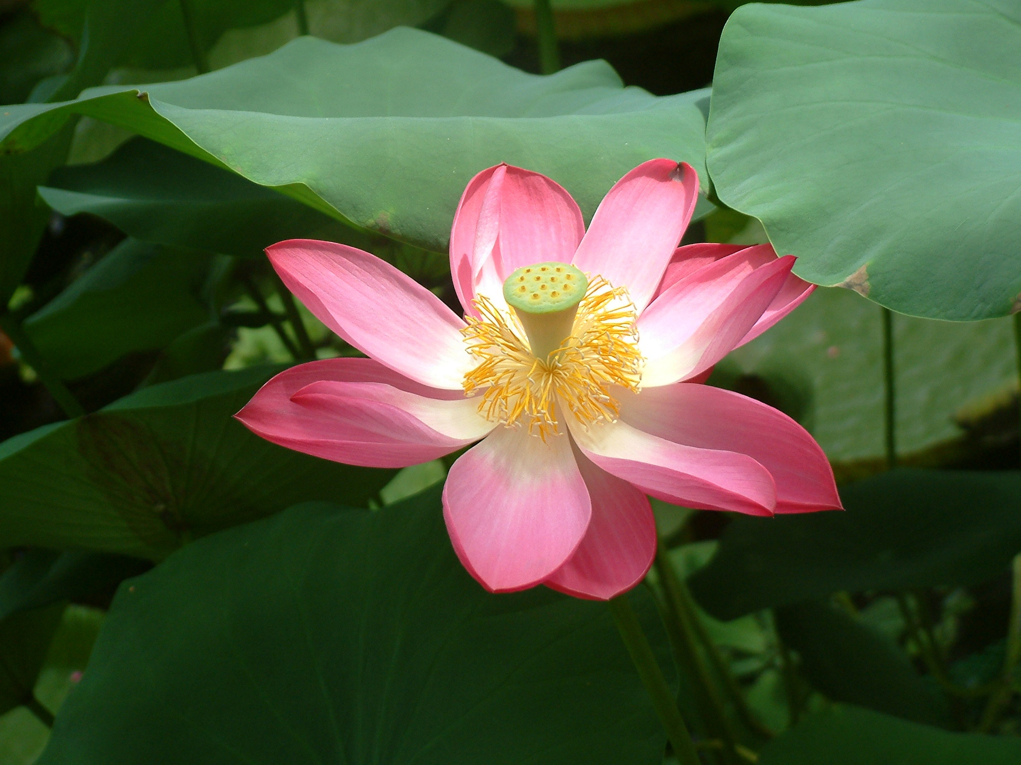 Nelumbo nucifera, Botanical garden in Poznań